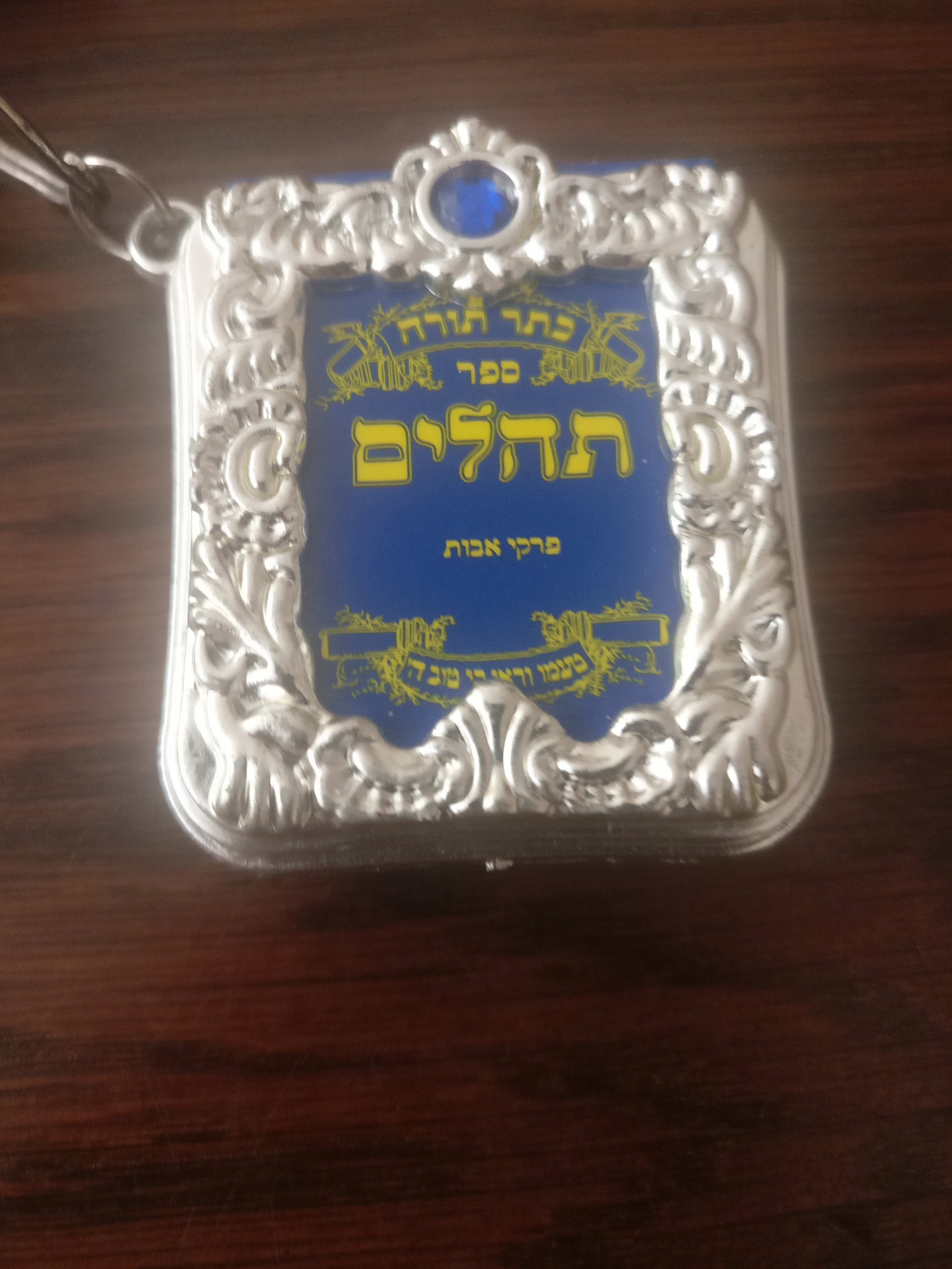 ספר תהילים קטן כמחזיק מפתחות.